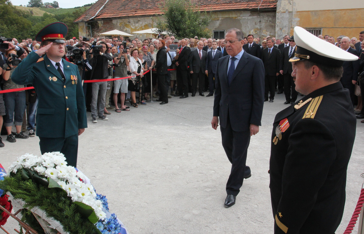 Spominska slovesnost in odprtje muzeja v spomin na umrle sovjetske vojne ujetnike.